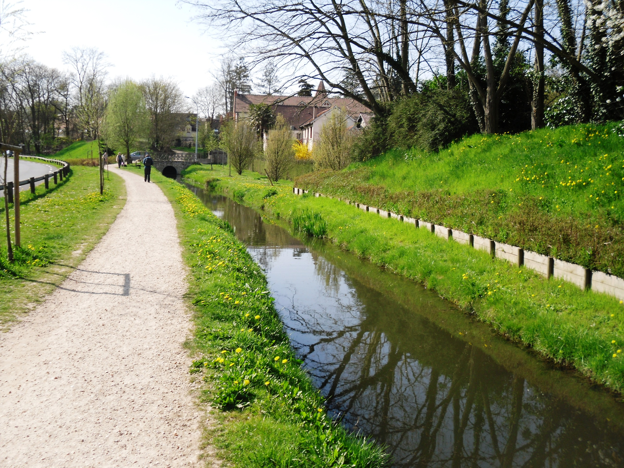 La rivière la Bièvre entre Massy et Verrières-le-Buisson (à droite)(91)